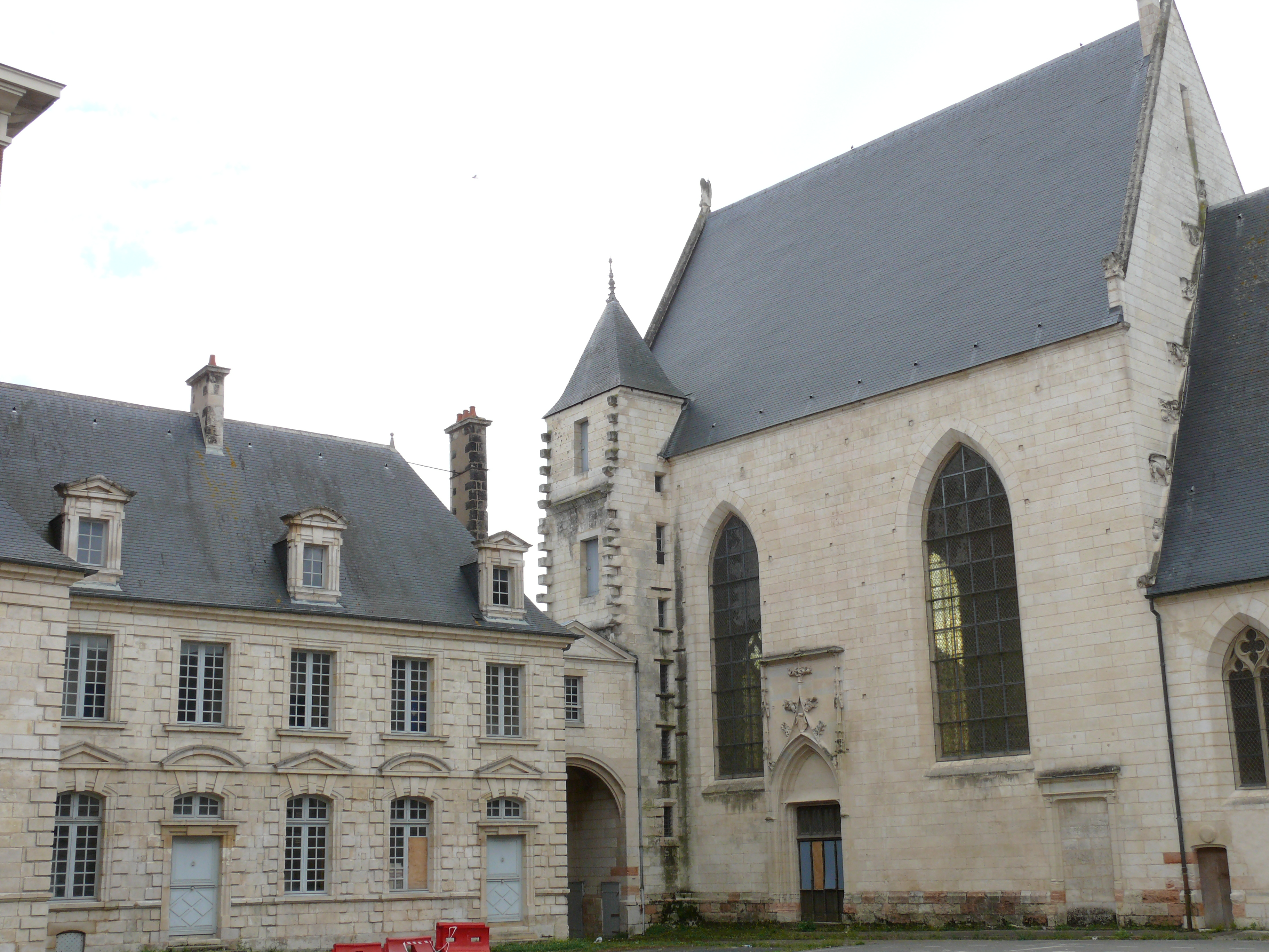 Bourges - Hôtel-Dieu - Chapelle et bâtiment côté rue Gambon